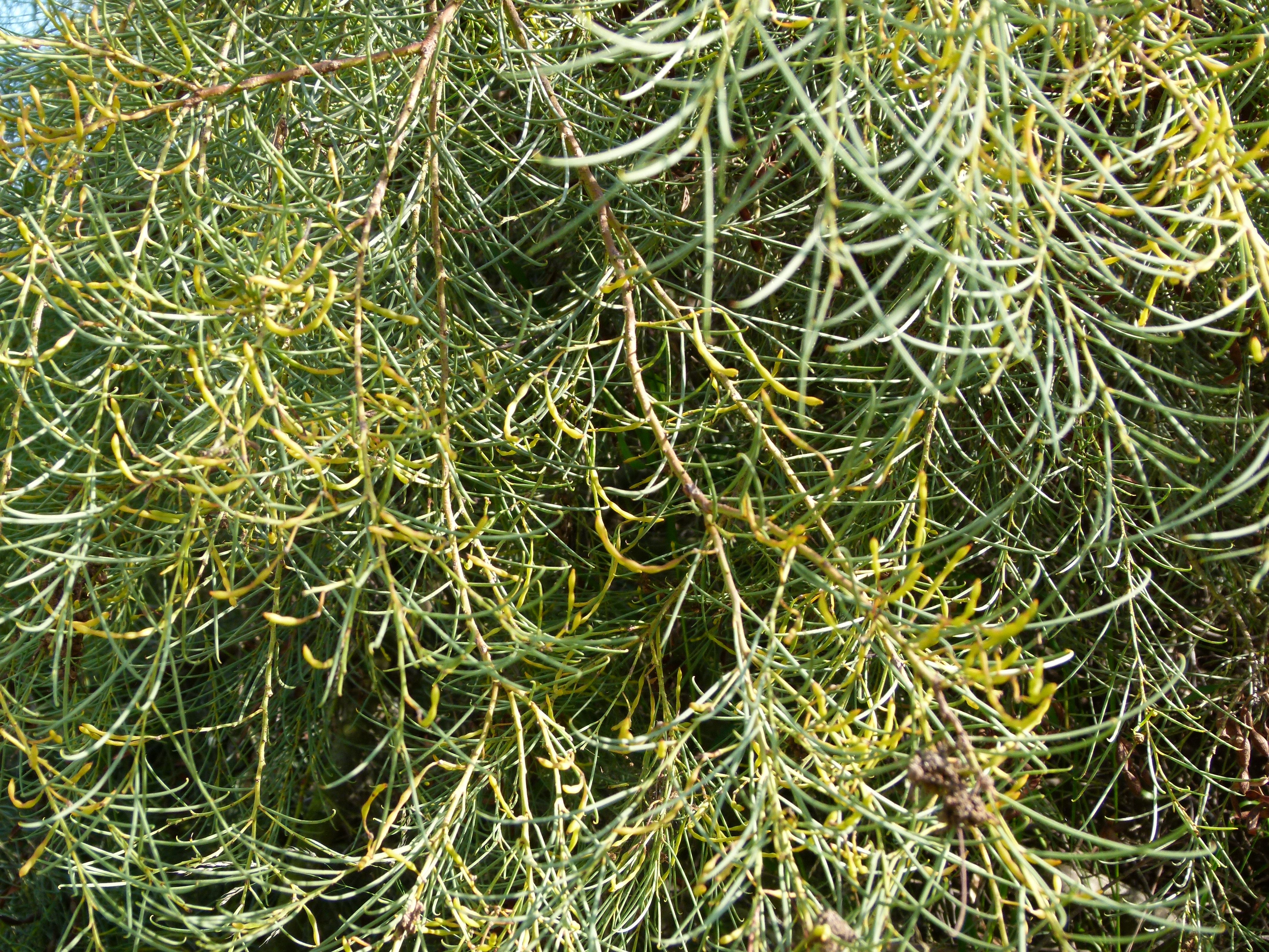 Jardin botanique Barcelone